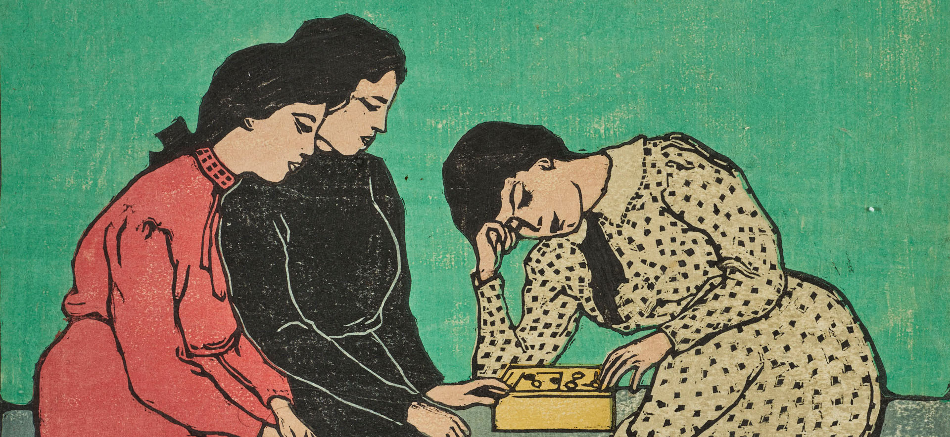 Emil Orlik - Drei Mädchen beim Brettspiel, 1906/1908, Farbholzschnitt